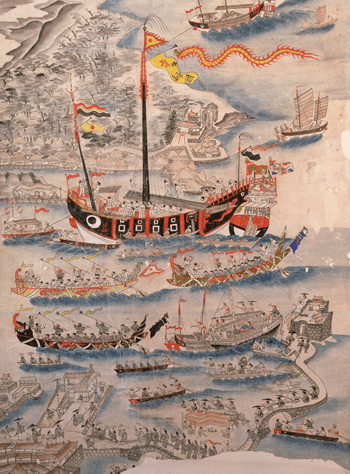 琉球王国の進貢船(Shinkosen of Ryukyu)